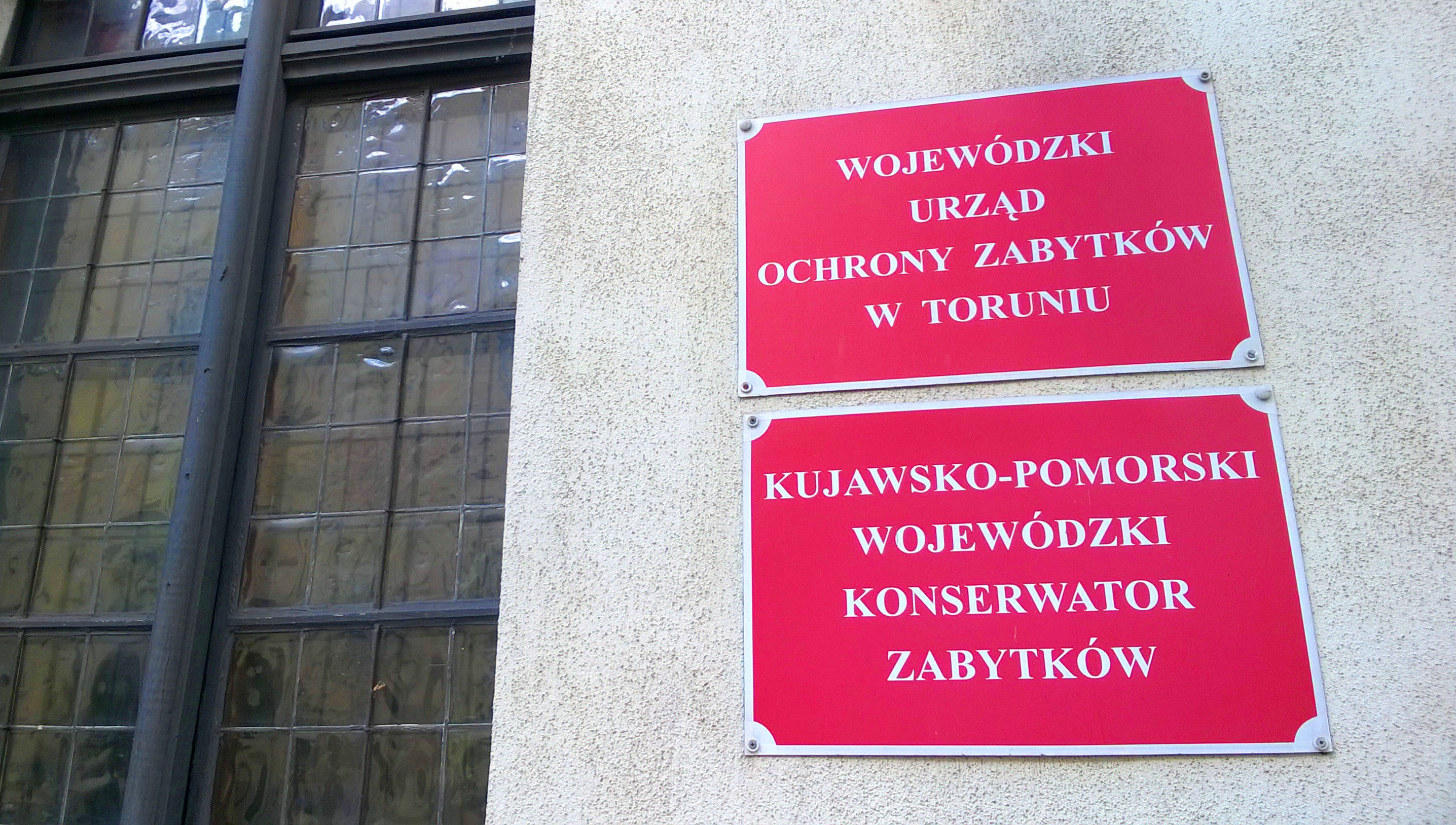 Siedziba Kujawsko-Pomorskiego Wojewódzkiego konserwatora zabytków w Toruniu